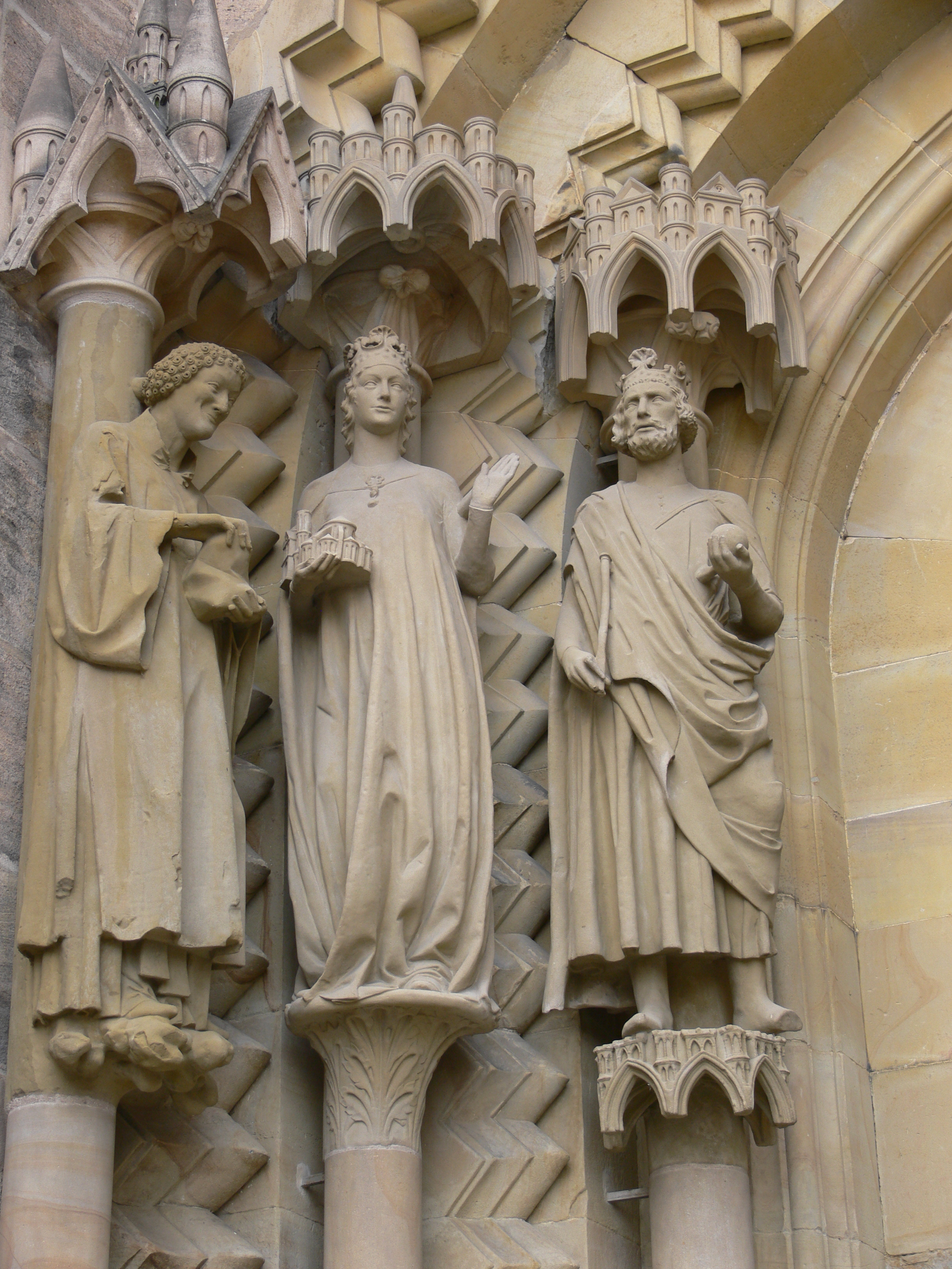 Bamberg, Dom St. Peter und St. Georg Adamspforte